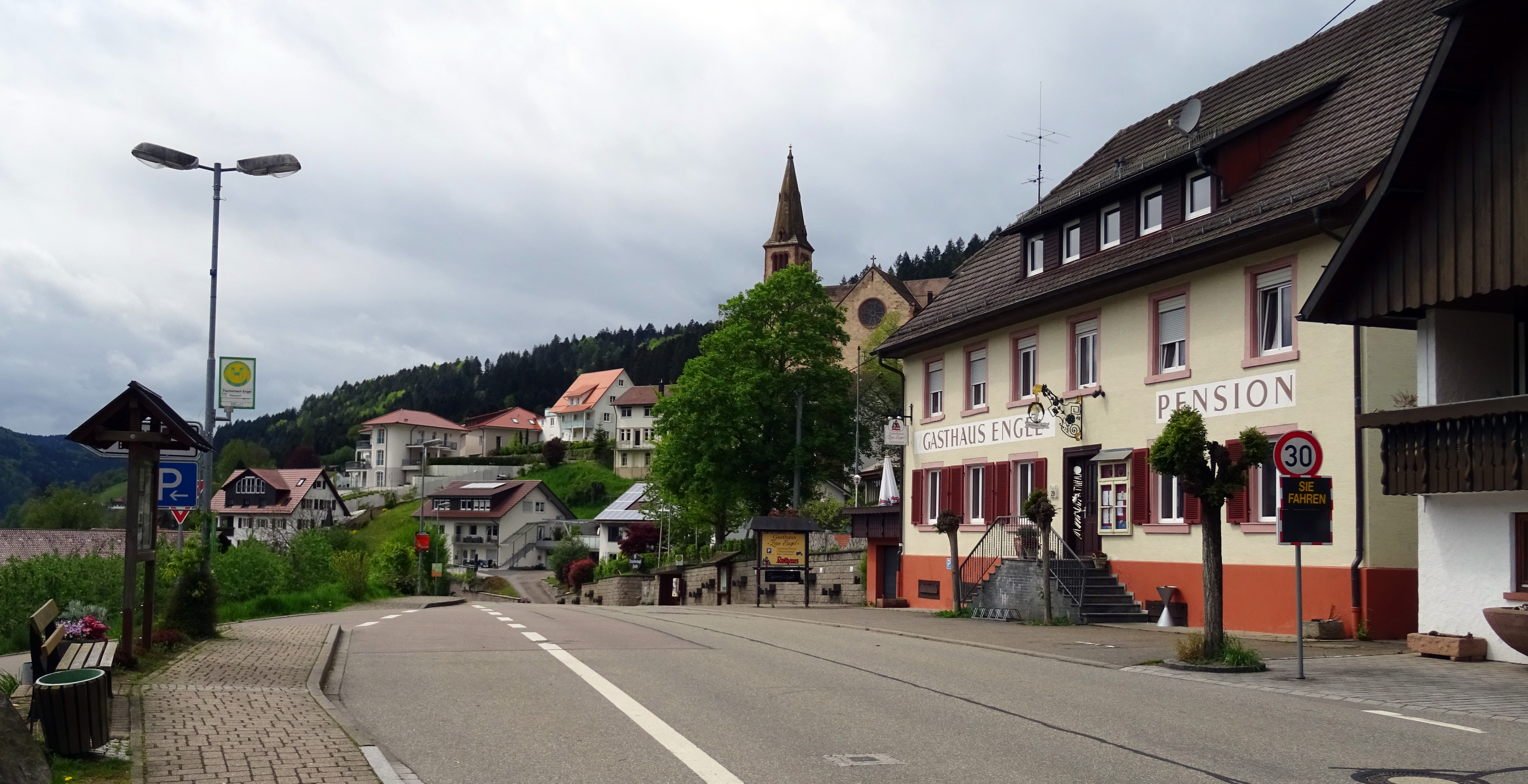 Fischerbach, Ortsmitte, Gasthaus Engel mit Bushaltestelle, Blick Richtung Westen